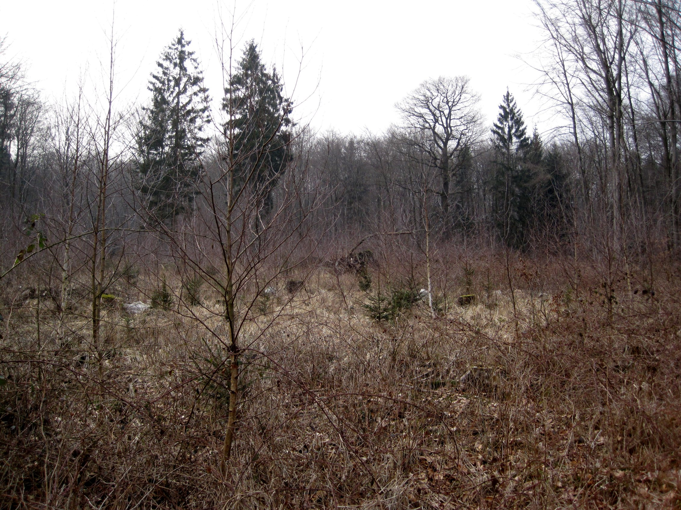 Naturwaldzelle Königsforst, NRW